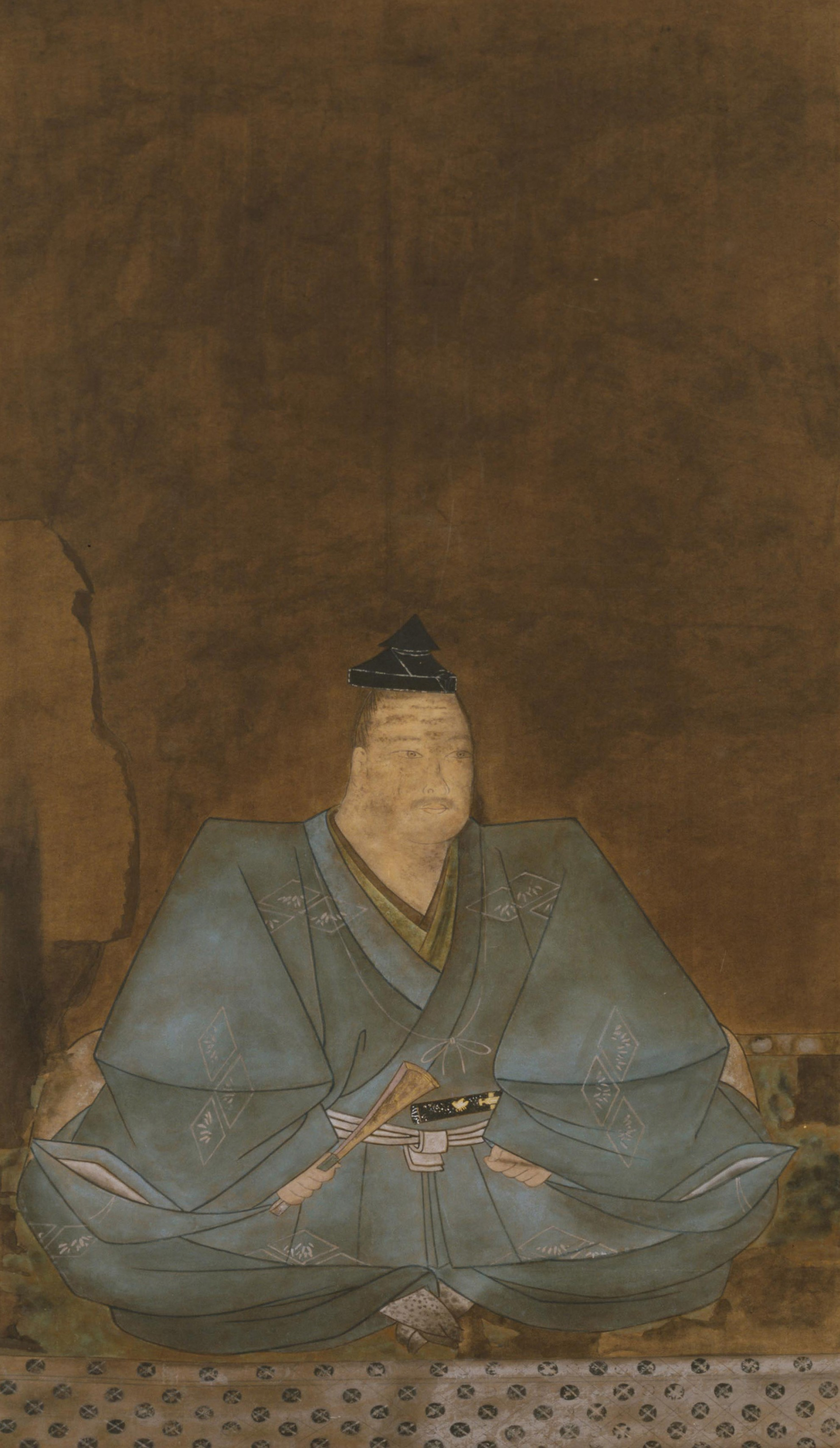 伊勢貞国の肖像。